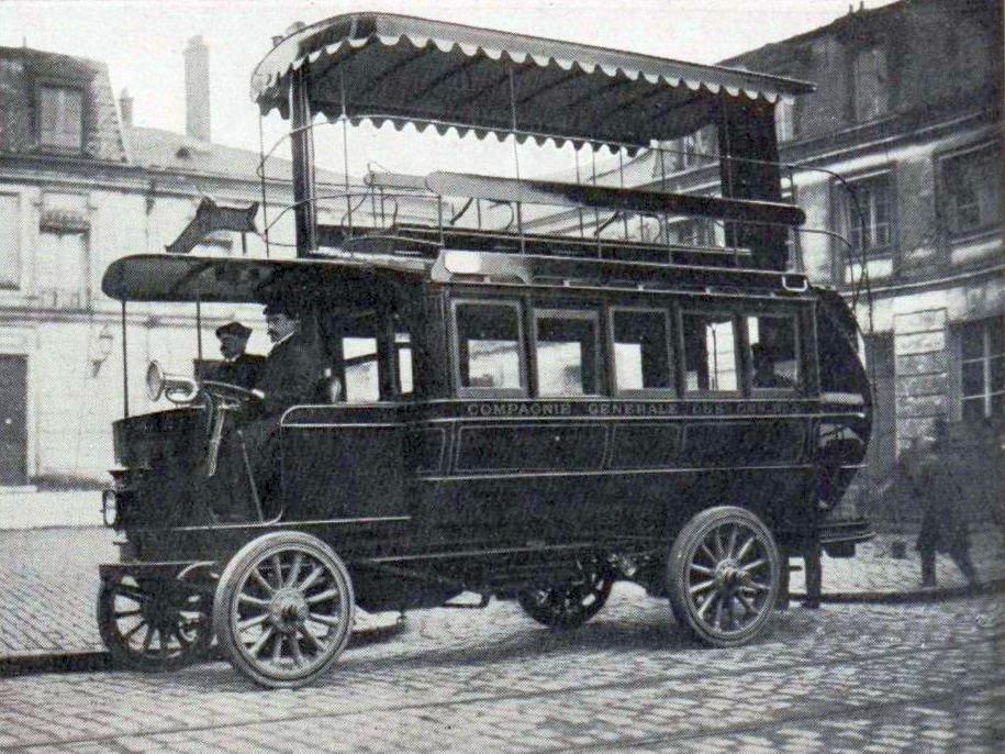 Omnibus automobile à vapeur Gardner-Serpollet, de la Compagnie Générale des Omnibus de Paris (1906)